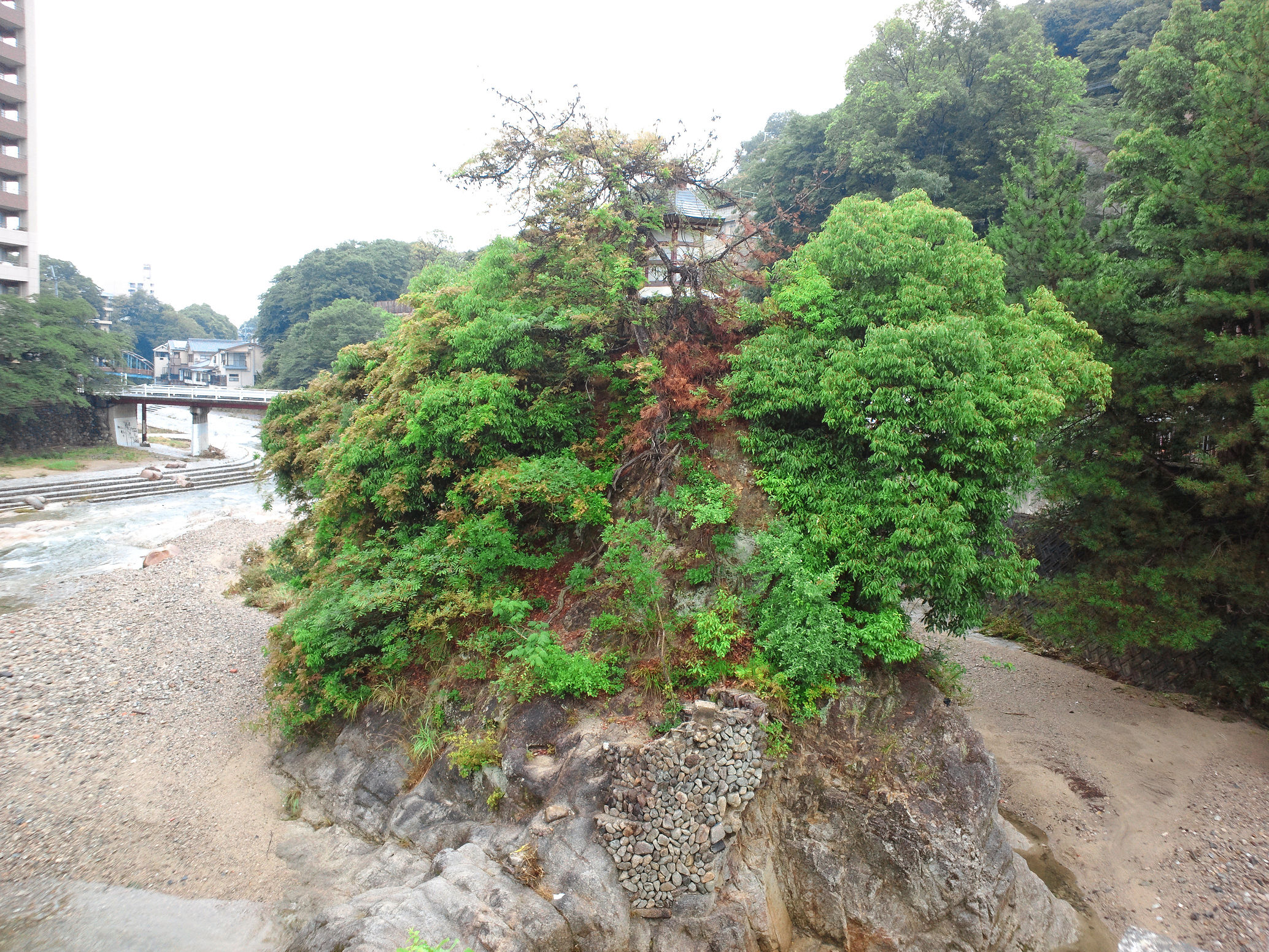 行者岩（長野温泉） 石川と天見川の合流地点（河内長野市）